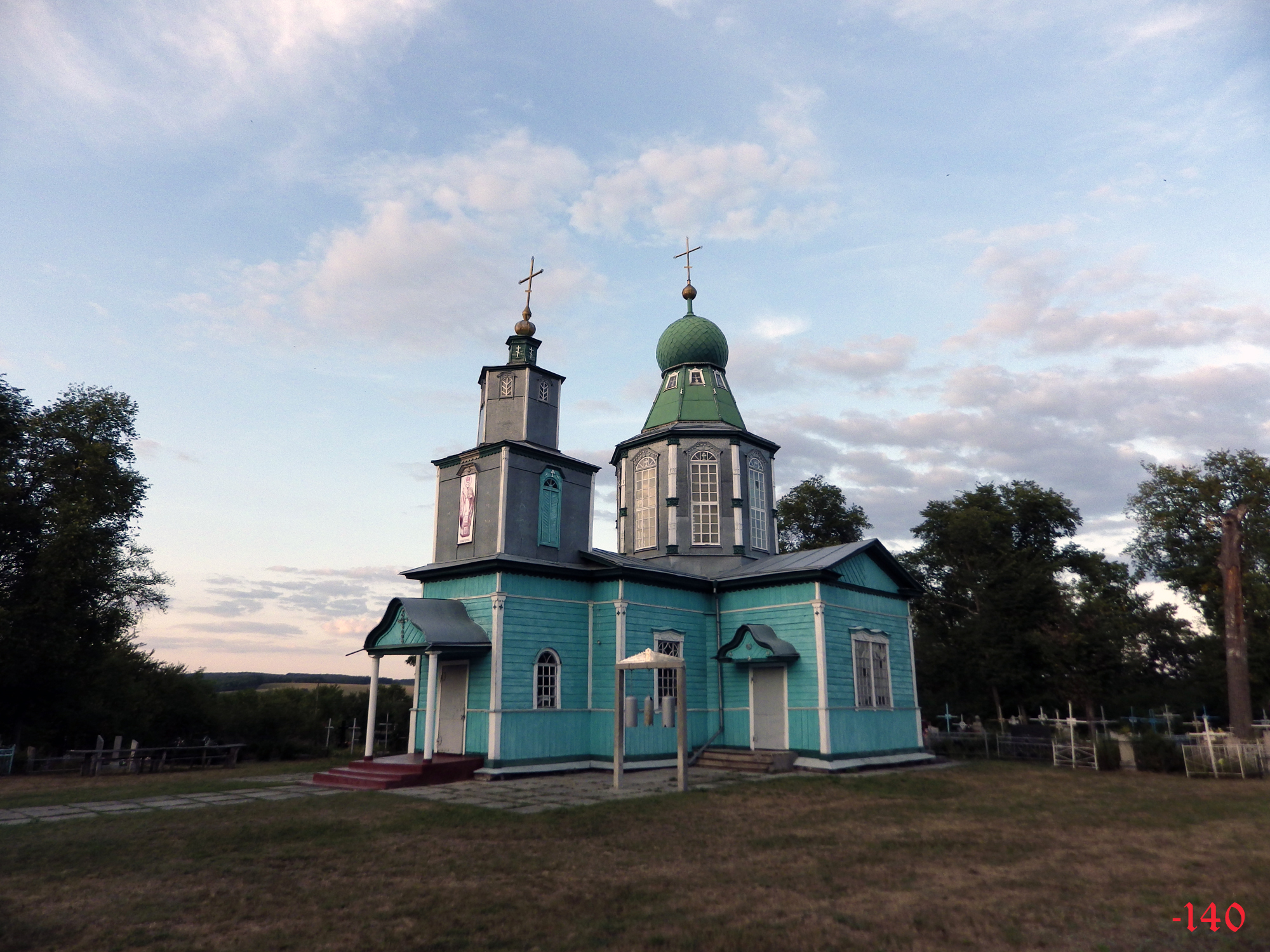 Церква Св. Миколи (Миколаївська церква) (дер.), с. Набоків, пров. Крилова, 6